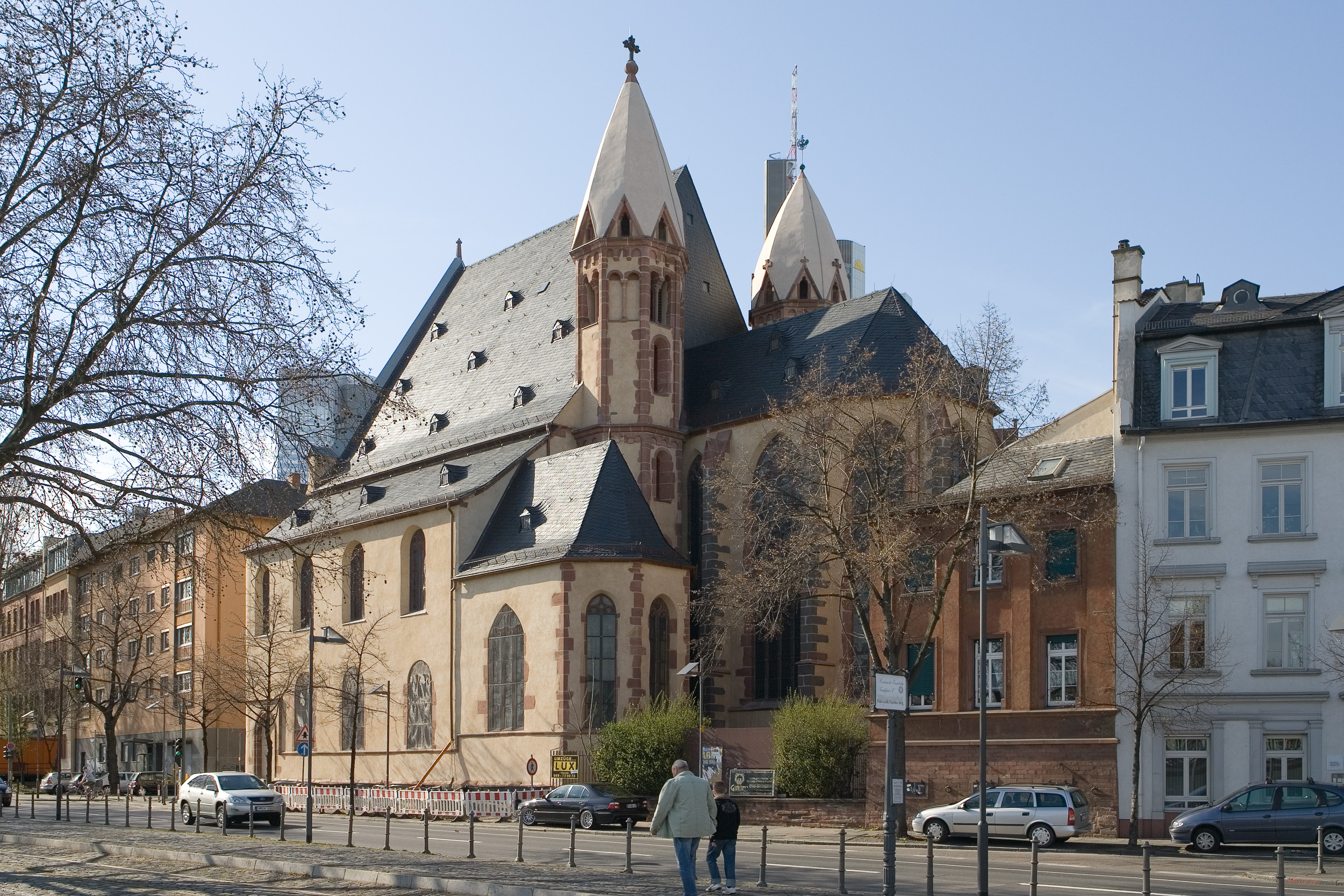 Leonhardskirche in Frankfurt am Main, vom Mainkai (Süden) aus gesehen. Selber fotografiert im März 2008, Doppellizensierung GFDL & CC-BY-SA 2.5.